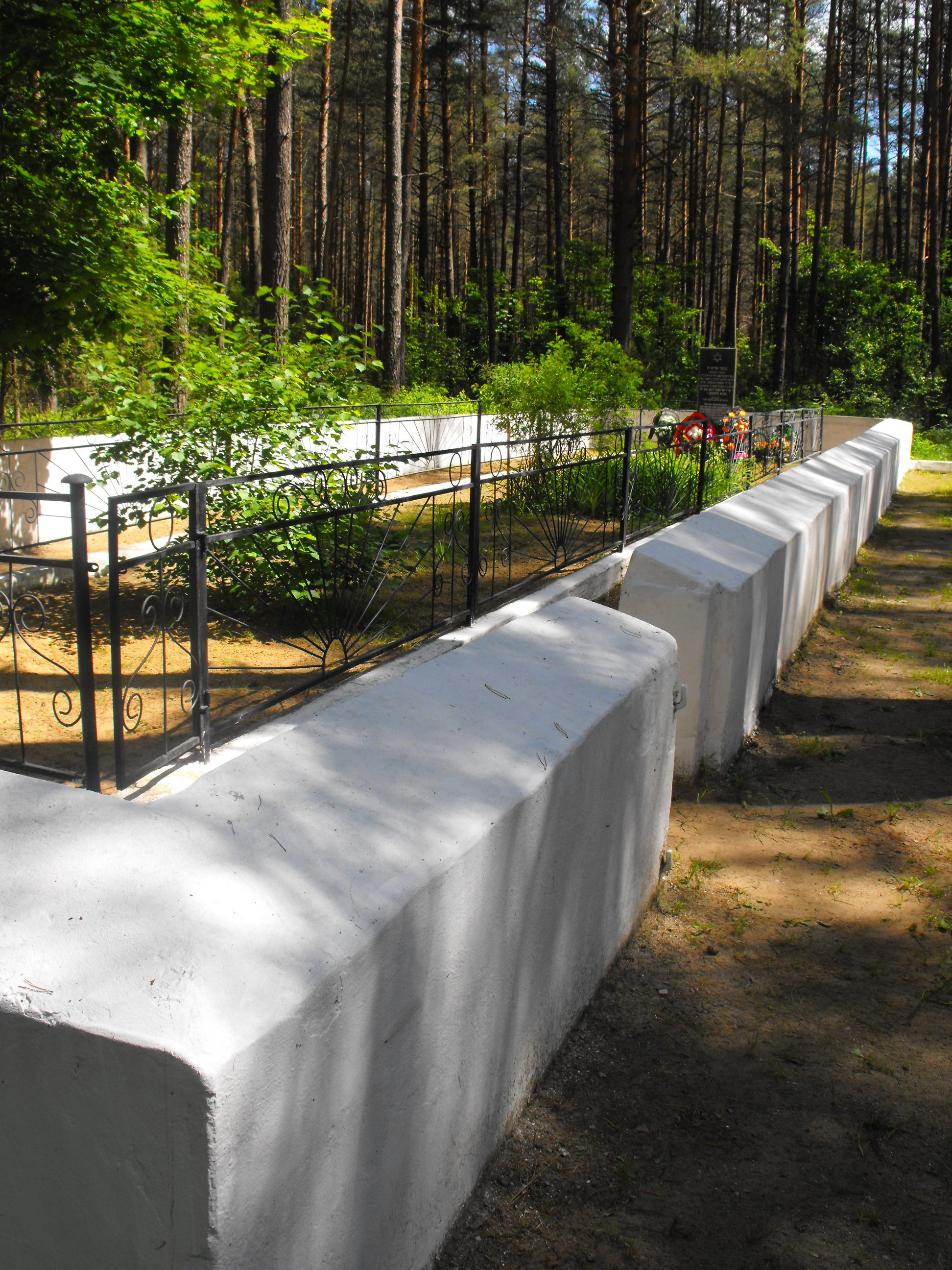 Мемориал на месте убийства 800 евреев Ивенца 9 июня 1942 года в урочище Пищуги